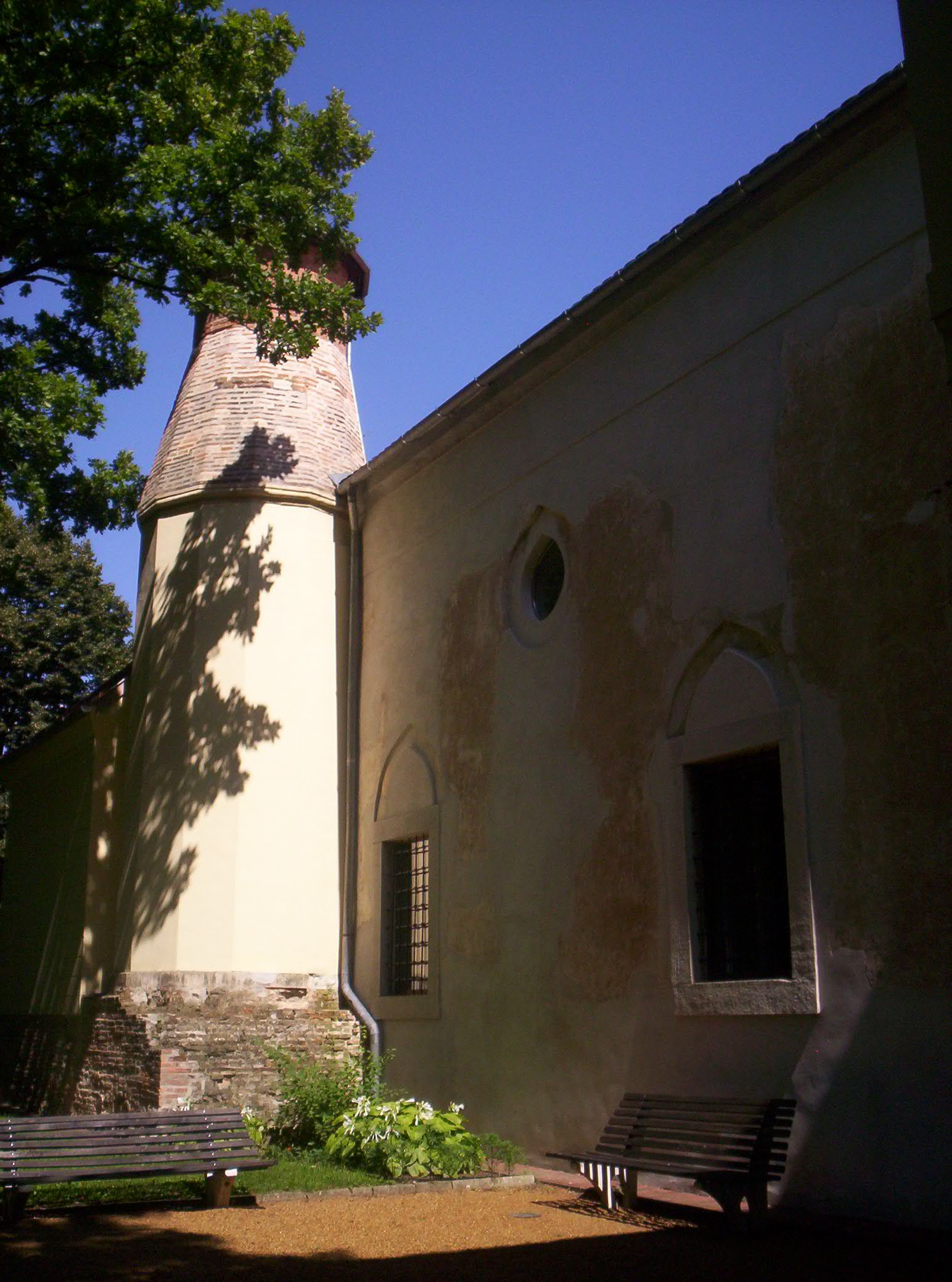 1566-ban, Szigetvár elfoglalása után a halott Szulejmán szultán tiszteletére emelték a törökök a szigetvári várban. Az első istentiszteletet 1566. szeptember 28-án tartották benne – photo taken by uploader User:Csanády in 2006.